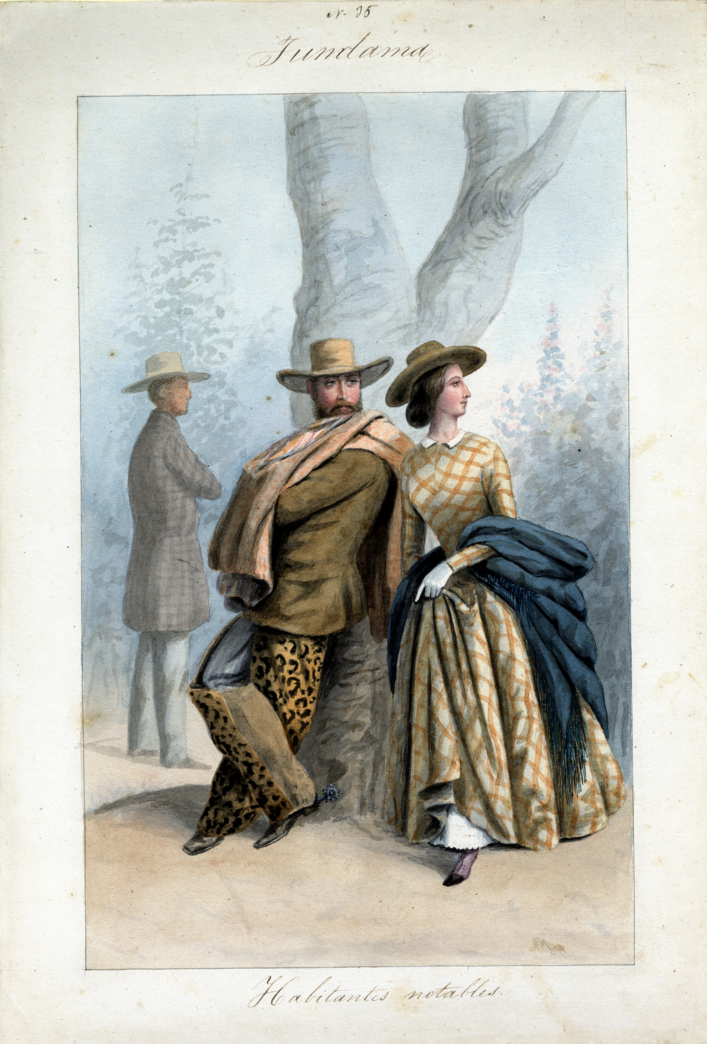 Esta acuarela de Carmelo Fernández (1809−1887) muestra a ciudadanos de la provincia de Tundama (actual departamento de Boyacá), noreste de Colombia. Las personas están bien vestidas. La pareja en primer plano parece ser de origen europeo, mientras que el individuo detrás del árbol quizás sea un mestizo. En sus pinturas, Fernández a menudo se centraba en los aspectos generales de un grupo humano más que en los individuos: trataba de representar los rasgos generales de las personas de diferentes orígenes étnicos, raciales y sociales. Fernández nació en San José de Guama, Venezuela, en una familia bien conectada (era el sobrino de José Antonio Páez, héroe de la independencia de Venezuela y presidente en tres períodos). Cuando todavía era joven, estudió arte en Nueva York. Regresó a Venezuela en 1827 y prestó servicio en el Ejército, donde desarrolló el dominio del dibujo topográficoLos disturbios políticos en Venezuela lo llevaron a mudarse a Nueva Granada (actual Colombia y Panamá) en 1849. Allí se convirtió en el primer dibujante de la Comisión Corográfica, cofundada y dirigida por Agustín Codazzi (1793-1859), geógrafo e ingeniero de origen italiano. La Comisión, que inició sus tareas en 1850, estudiaba la geografía, la cartografía, los recursos naturales, la historia natural, la cultura regional y la agricultura de Nueva Granada. Entre 1850 y 1852, Fernández pintó alrededor de 30 acuarelas en las provincias al noreste de Bogotá: Tunja, Pamplona, Ocaña, Socorro, Vélez y Santander. Estas obras, que ahora están en la Biblioteca Nacional de Colombia, representan diversos grupos étnicos, raciales y sociales, además del variado paisaje físico de la Nueva Granada. En la Comisión, a Fernández le sucedieron Henry Price (1819-1863) y, más tarde, Manuel María Paz (1820-1902). Regresó a Caracas a los 43 años, donde vivió casi todo el resto de su vida. En 1873 produjo su obra más famosa: un retrato de Simón Bolívar que aparece en las monedas venezolanas.